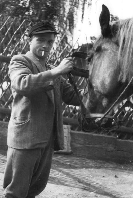 Cunnersdorf, Umsiedler Illus Klügel 21.9.50 Zu den Volkswahlen am 15. Oktober 1950. Der Neubauer Richard Prietzel. Cunnersdorf bei Dresden, ist Umsiedler aus Schlesien. Er hat hier eine neue Heimat gefunden. Er versicherte: "Für mich steht es fest, am 15. Oktober die Kandidaten der Nationalen Front zu wählen. Denn ich habe hier eine neue und schöne Heimat gefunden, habe schon wieder einen ganz netten Viehbestand und genieße alle Rechte als Bürger der DDR. Ich rufe hiermit alle Schlesiendeutschen auf, sich meiner Meinung anzuschließen und will auch noch in unserer Gemeinde bei allen Umsiedlern aufklärend wirken, damit alle ihre Stimme am 15. Oktober den Kandidaten der Nationalen Front geben.